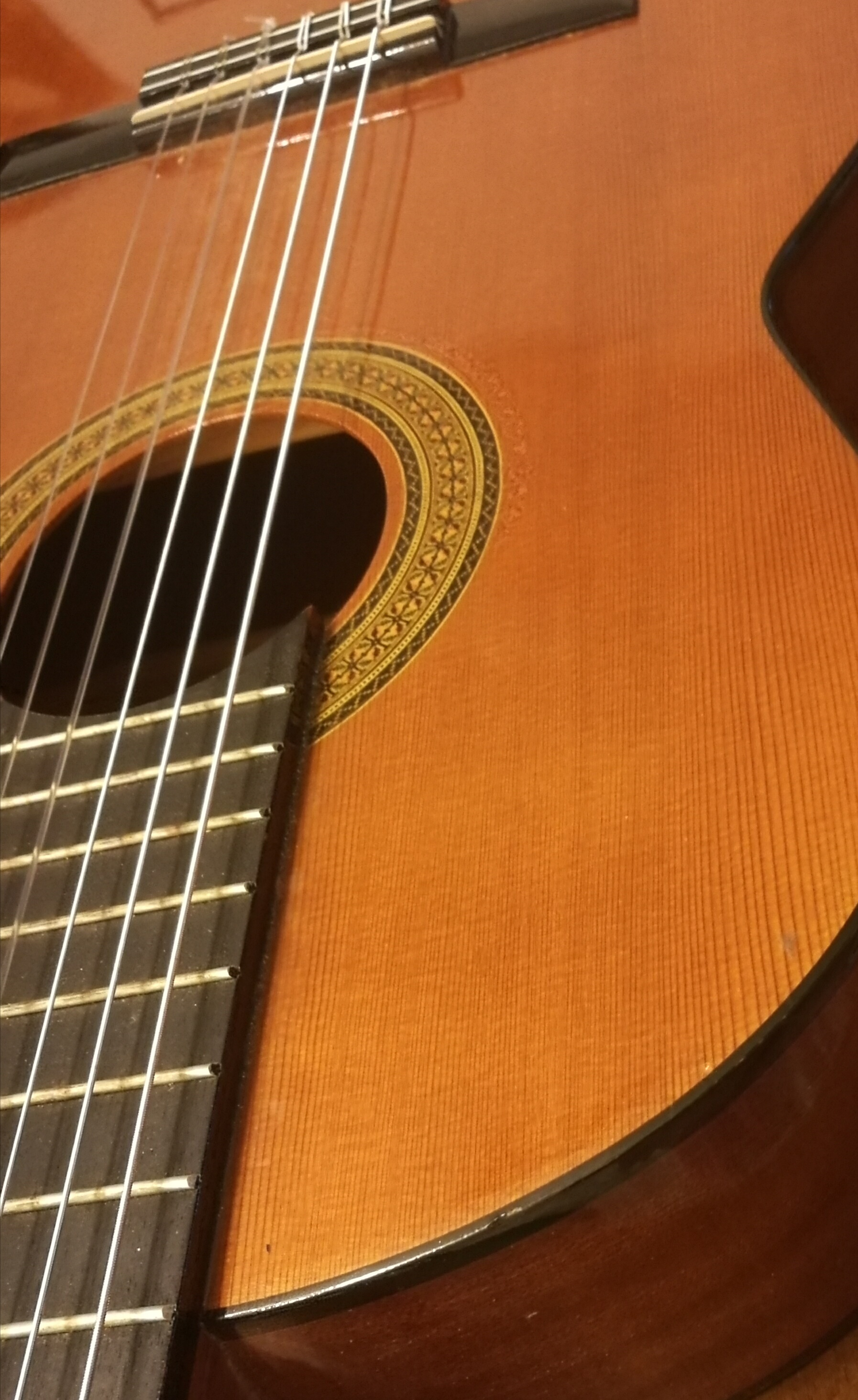 גיטרה- כלי נגינה